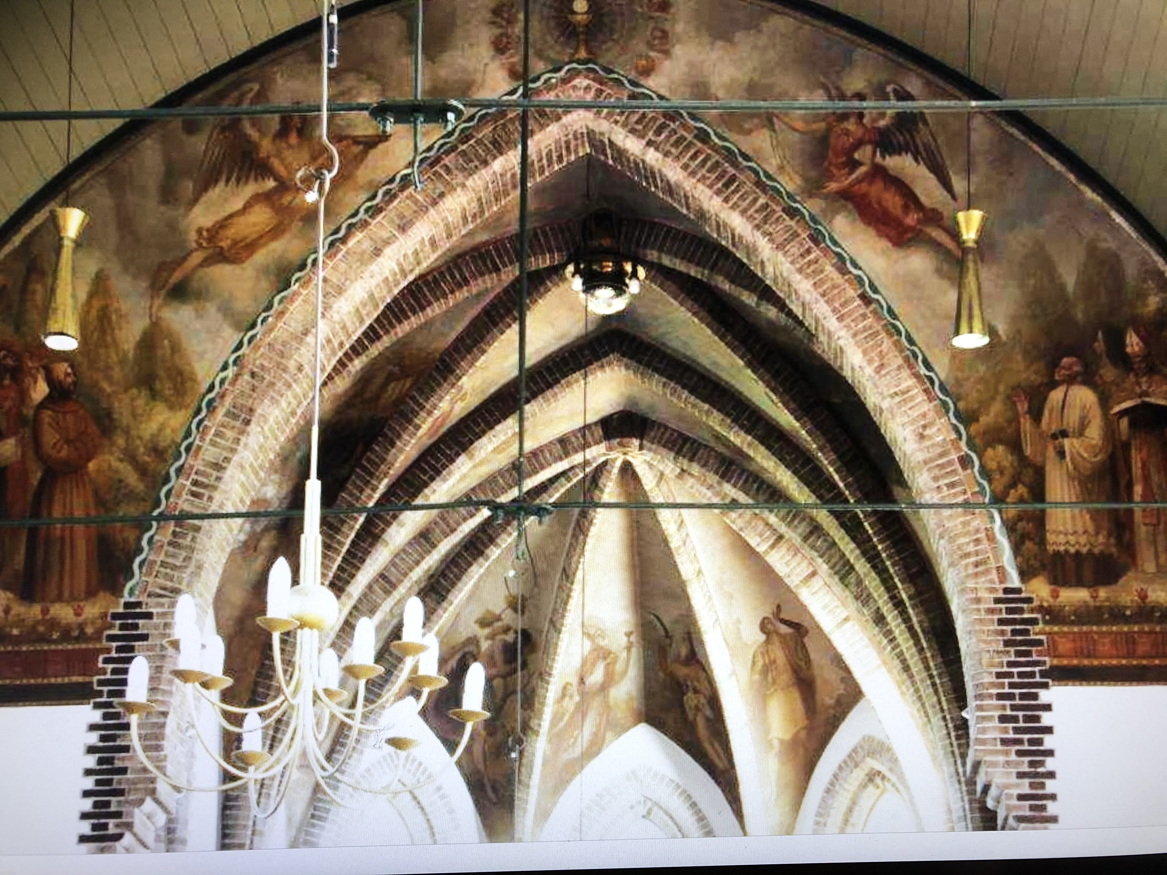 foto van de triomfboog van de kerk in Nes